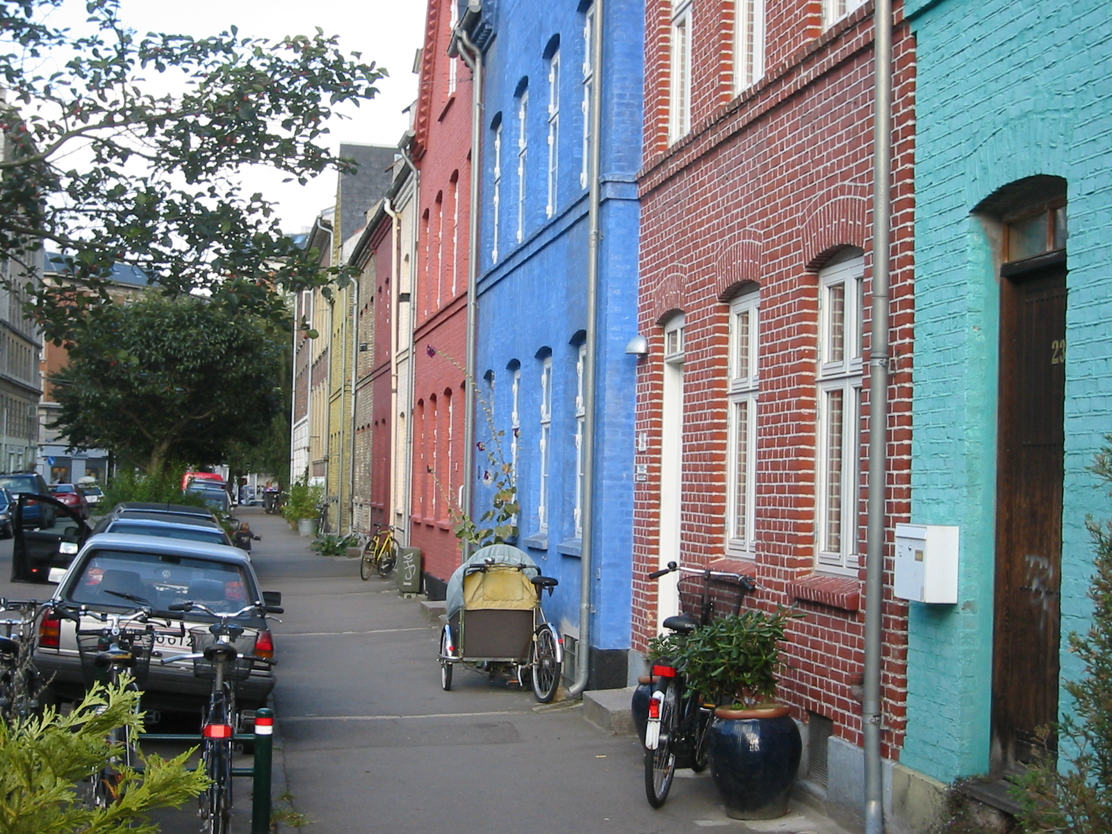 Olufsvej in the Østerbro district of Copenhagen, Denmark. Buildings designed by Frederik Bøttger for Arbejdernes Byggeforening